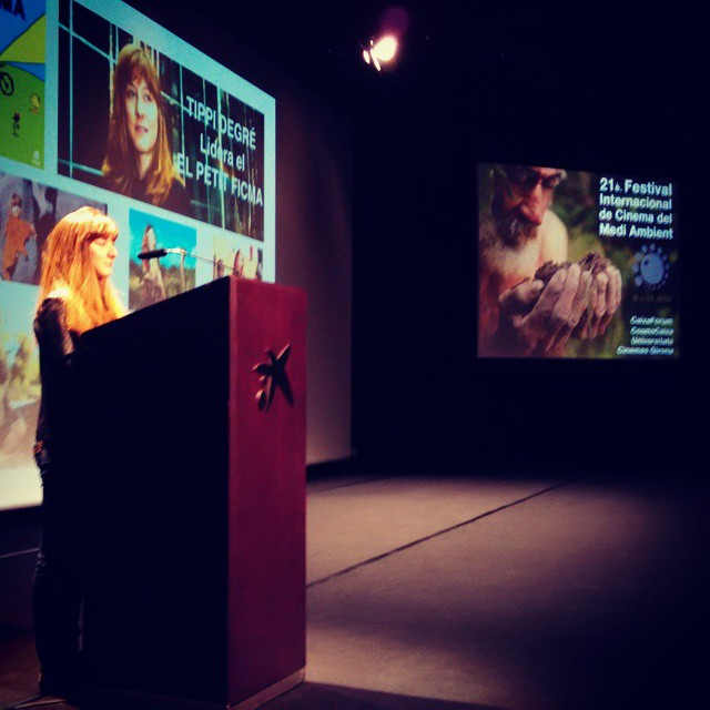 Tippi Degré, directrice de "El Petit FICMA", section enfants de FICMA (Festival Internacional de Cine de Medio Ambiente/International Environmental Film Festival).